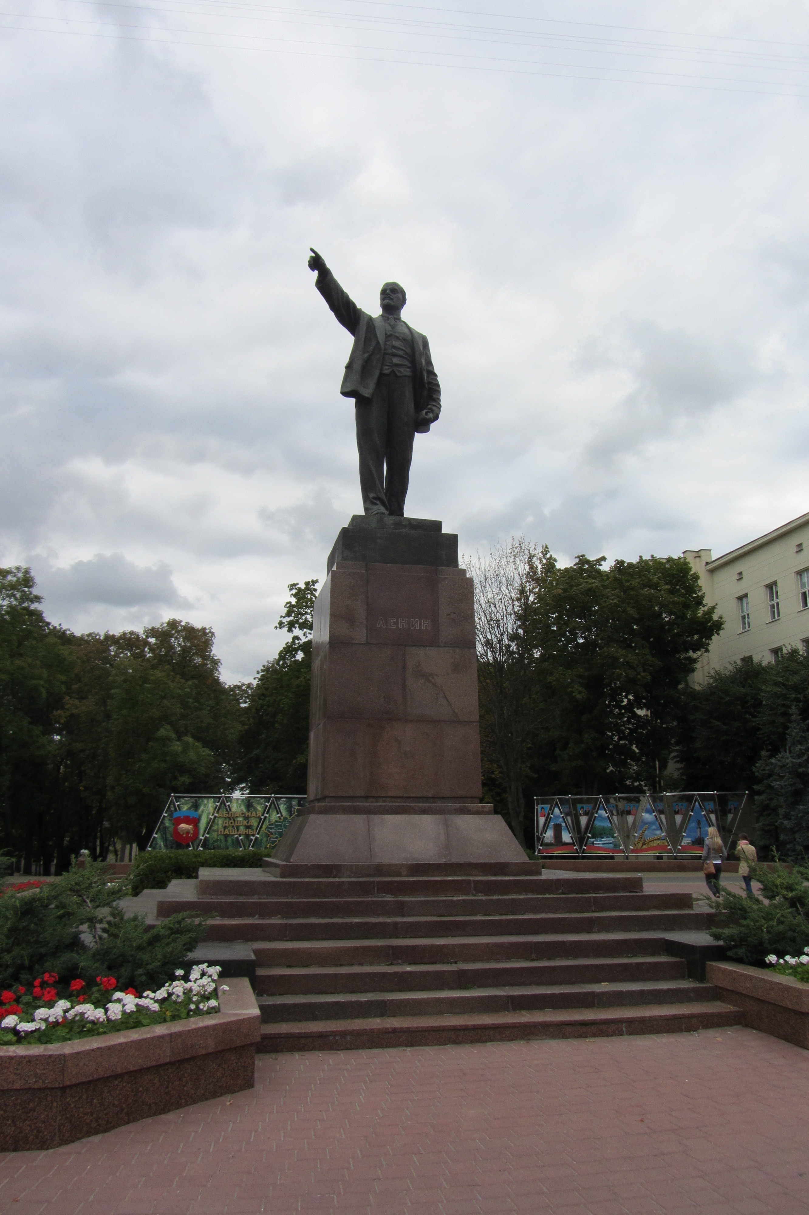 Беларуская (тарашкевіца): Забудова пл. Леніна. г. Берасьце This is a photo of Belarusian heritage monument. Reference number: 113Г000013 ( WLM)